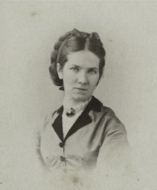 Анна Алексеевна Васильева-Шиловская (1841-1910)